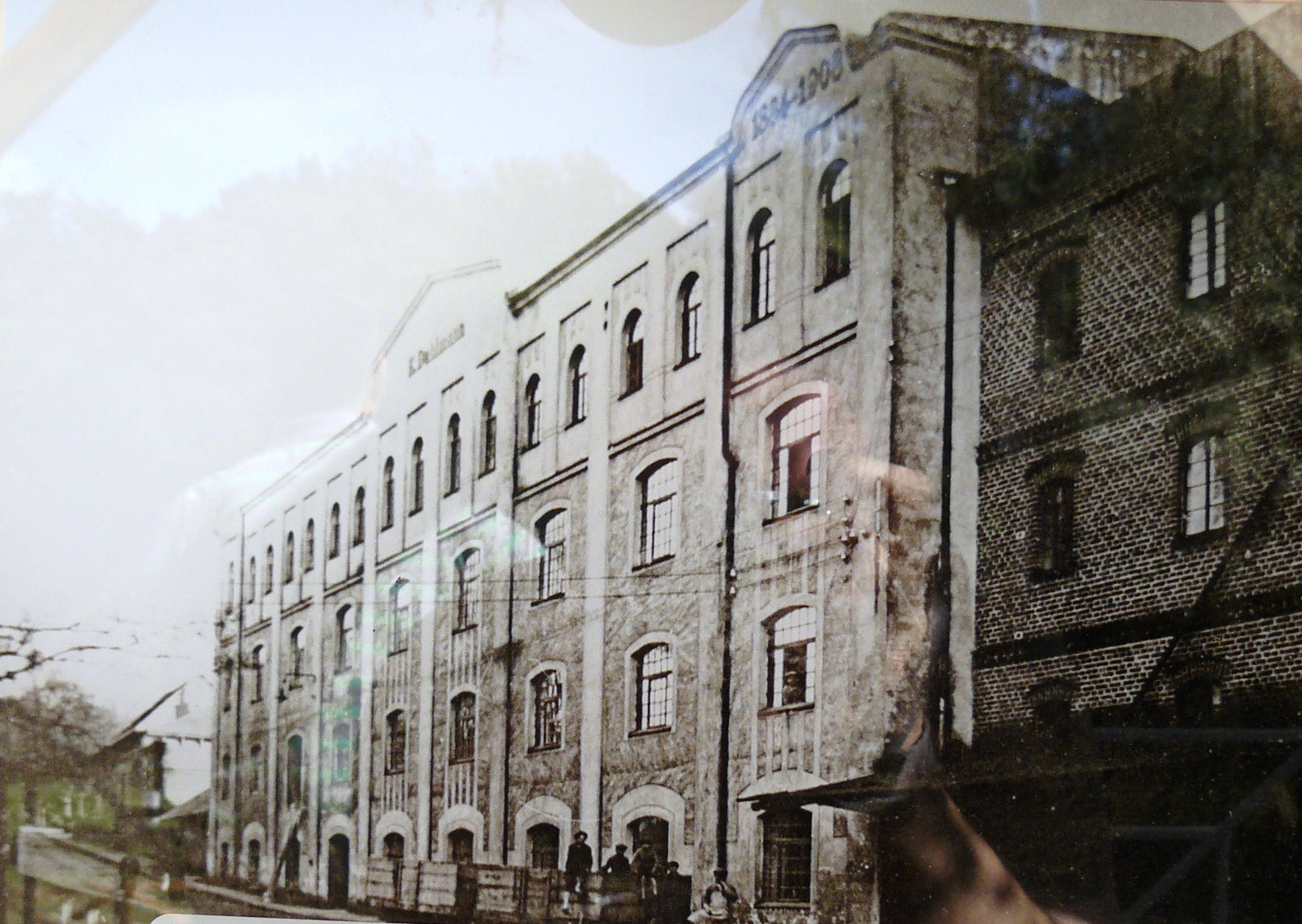 Młyn Dahlmanna w Obornikach. Kolej Dahlmanna (przemysłowa).